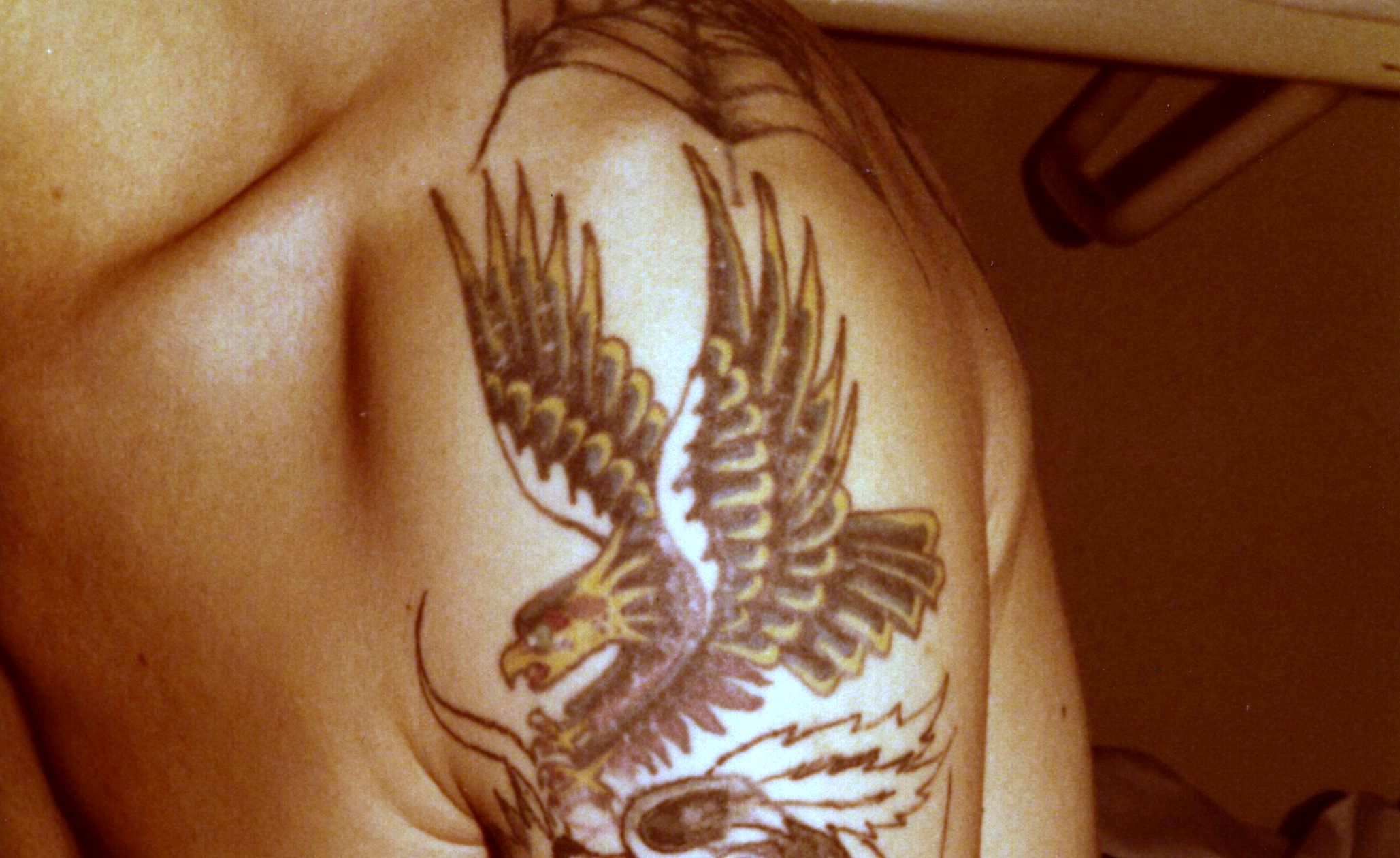 Linker Oberarm des Tätowierers Manfred Kohrs. Der Adler wurde angefertigt von Herbert Hoffmann (1919-2010) im Jahr 1975.